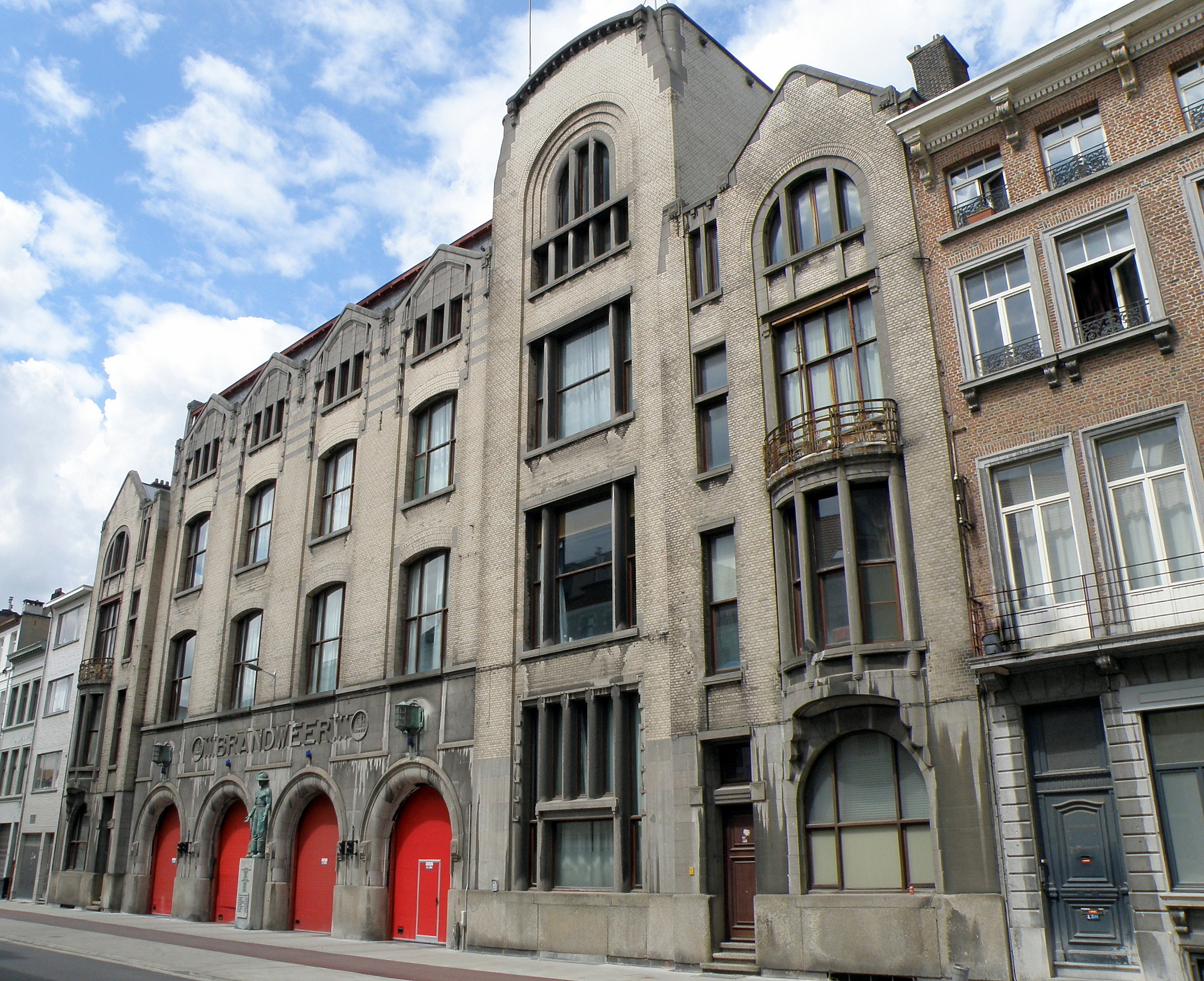 Antwerpen, België. Brandweerkazerne Paleisstraat, gevel aan de Paleisstraat. Ontwerp van archit. Emiel Van Averbeke en Jan van Asperen, anno 1907.